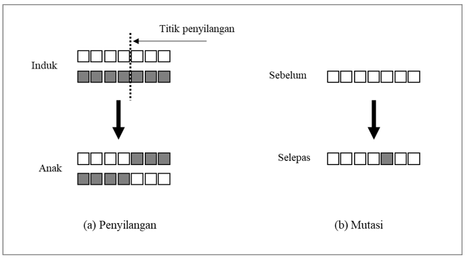 Contoh proses penyilangan dan mutasi dalam algoritma genetik